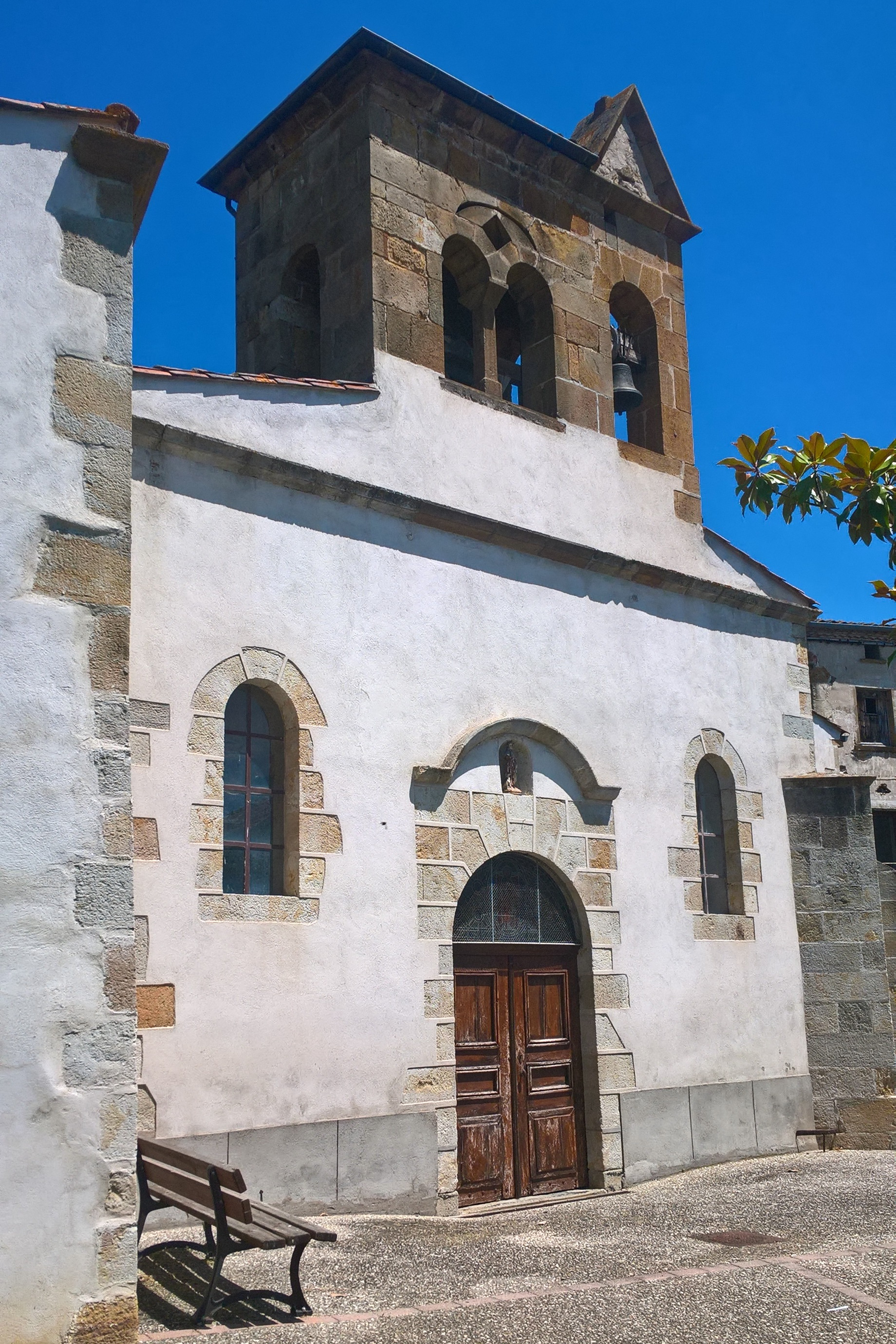 Parent, église, façade ouest